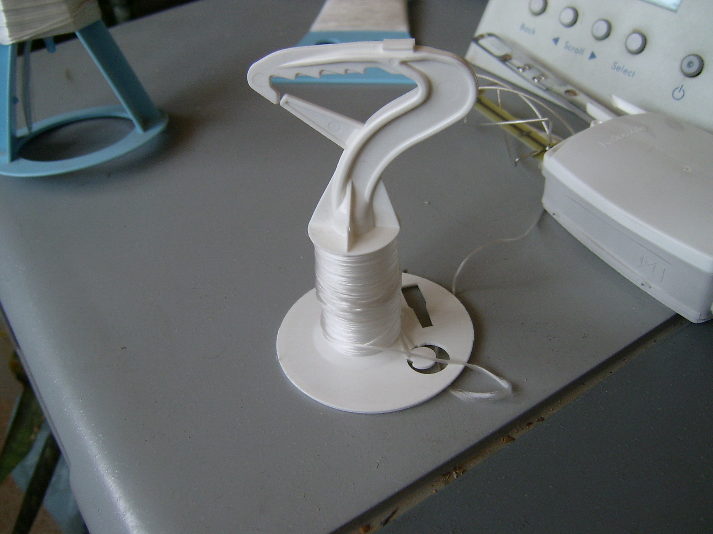 نخ بازکن وسیله ای برای باز کردن نخ بین ۳۰ تا ۶۰ متر نخ متصل کننده رادیوسوند به بالون هواشناسی. این وسیله در آغاز رها کردن بالون نخ را به آرامی باز می کند و پس از اینکه بالون به قدر کافی ارتفاع گرفت با سرعت بیشتری نخ را باز می نماید